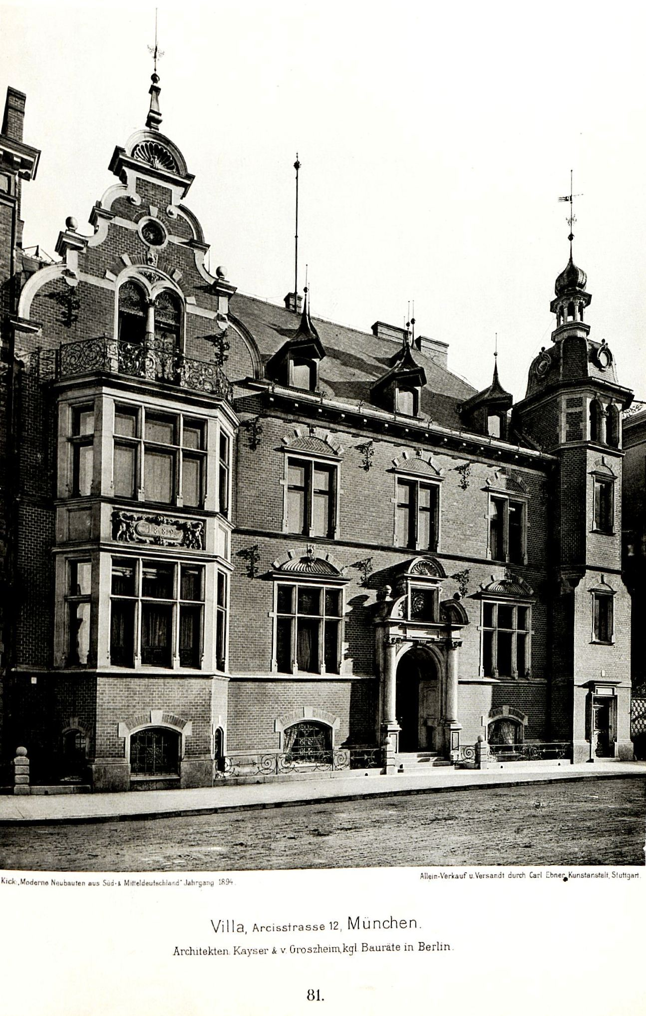 Palais Pringsheim, Arcisstraße 12, München, Portal. Architekten Kaiser & v. Groszheim, kgl. Bauräte in Berlin.